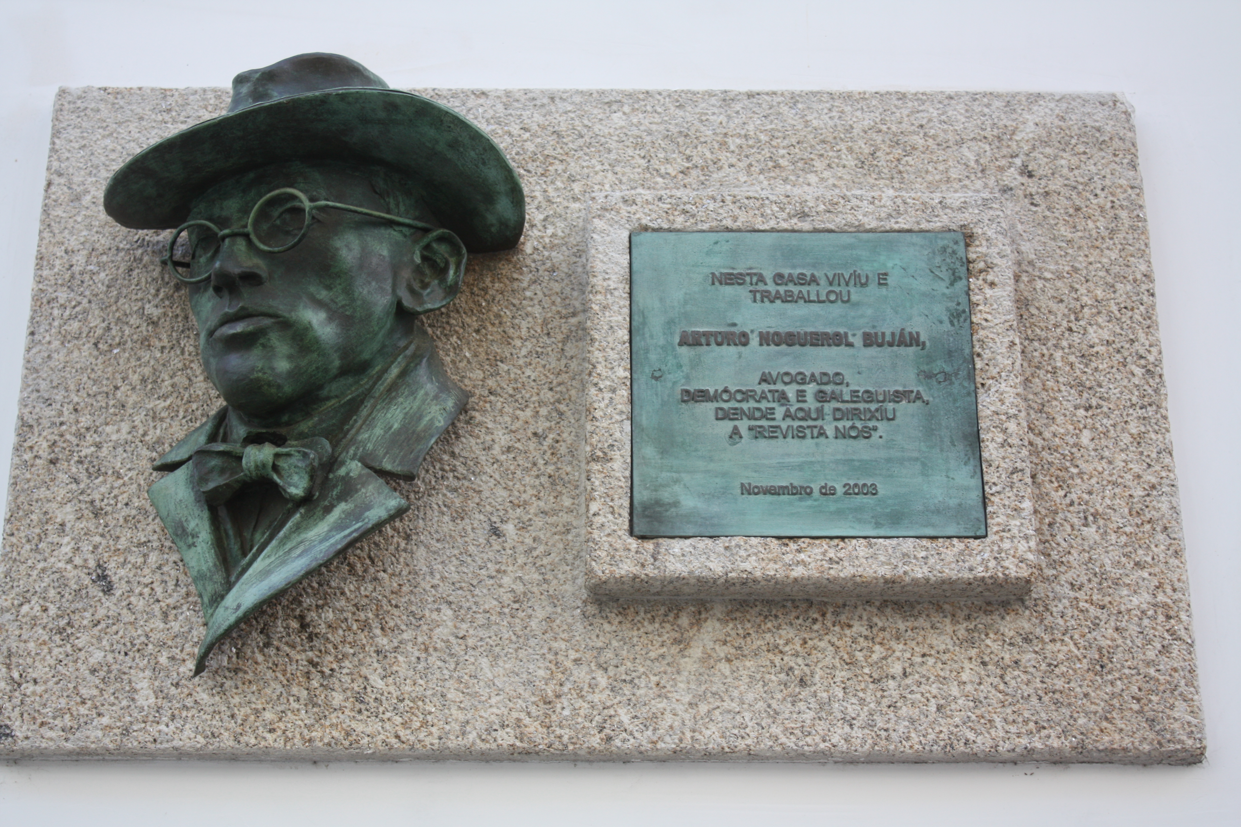 Placa na casa onde viviu Arturo Noguerol Buján (Ourense), obra de Manuel Molares